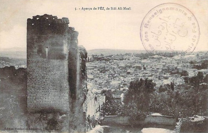 Carte postale de Fès (Maroc). Vue sur le quartier el-Bali à partir du mausolée de Sidi Ali Mzali